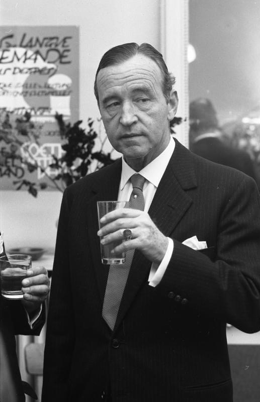 Anl. Einweihung der neuen Botschaft der BRD in Paris Feier für Frl. Redlich nach 41 Dienstjahren (Ausscheiden) mit Botsch. Klaiber (Foto).